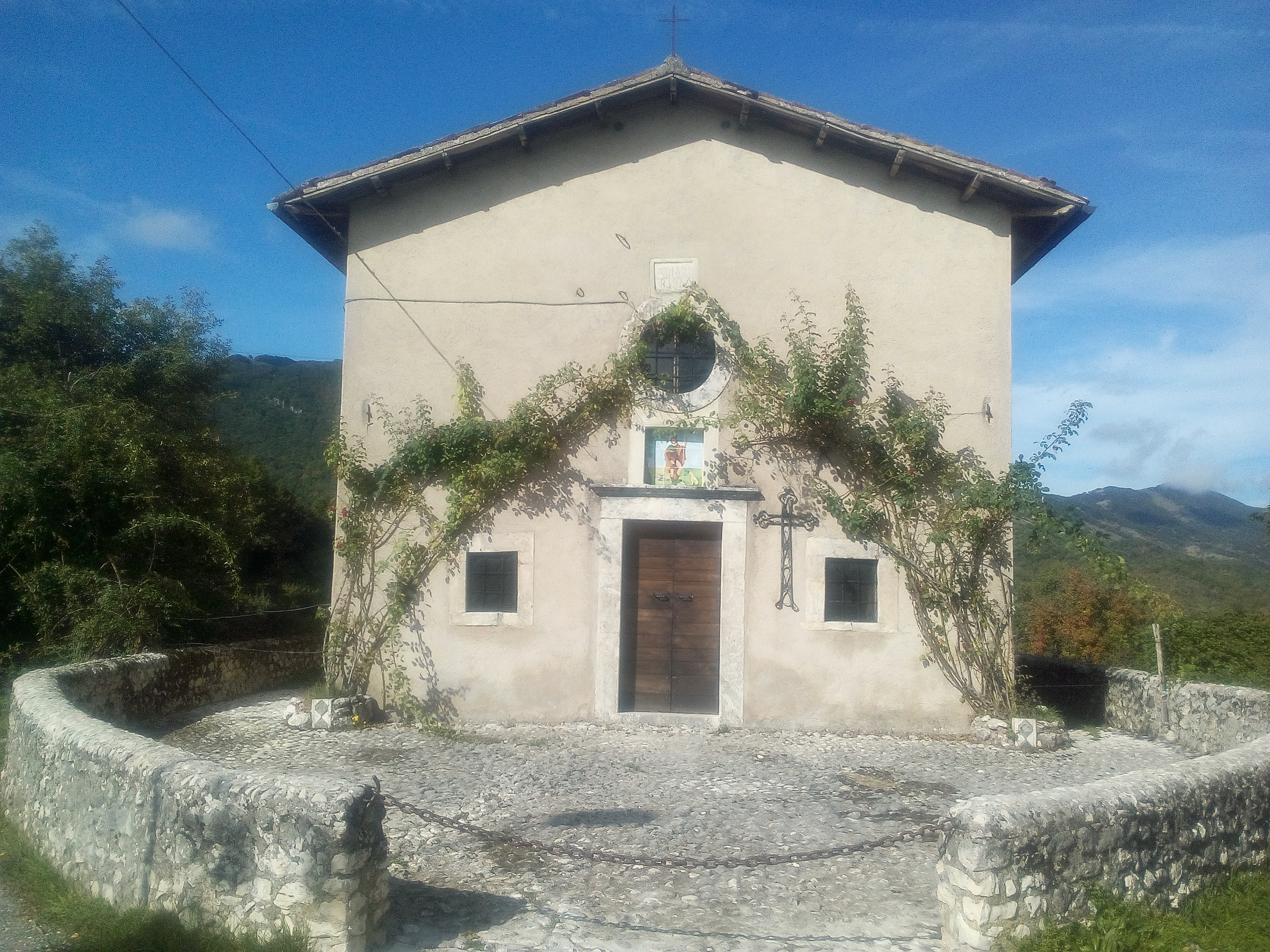 Chiesa sussidiaria di San Rocco a Petrella Liri